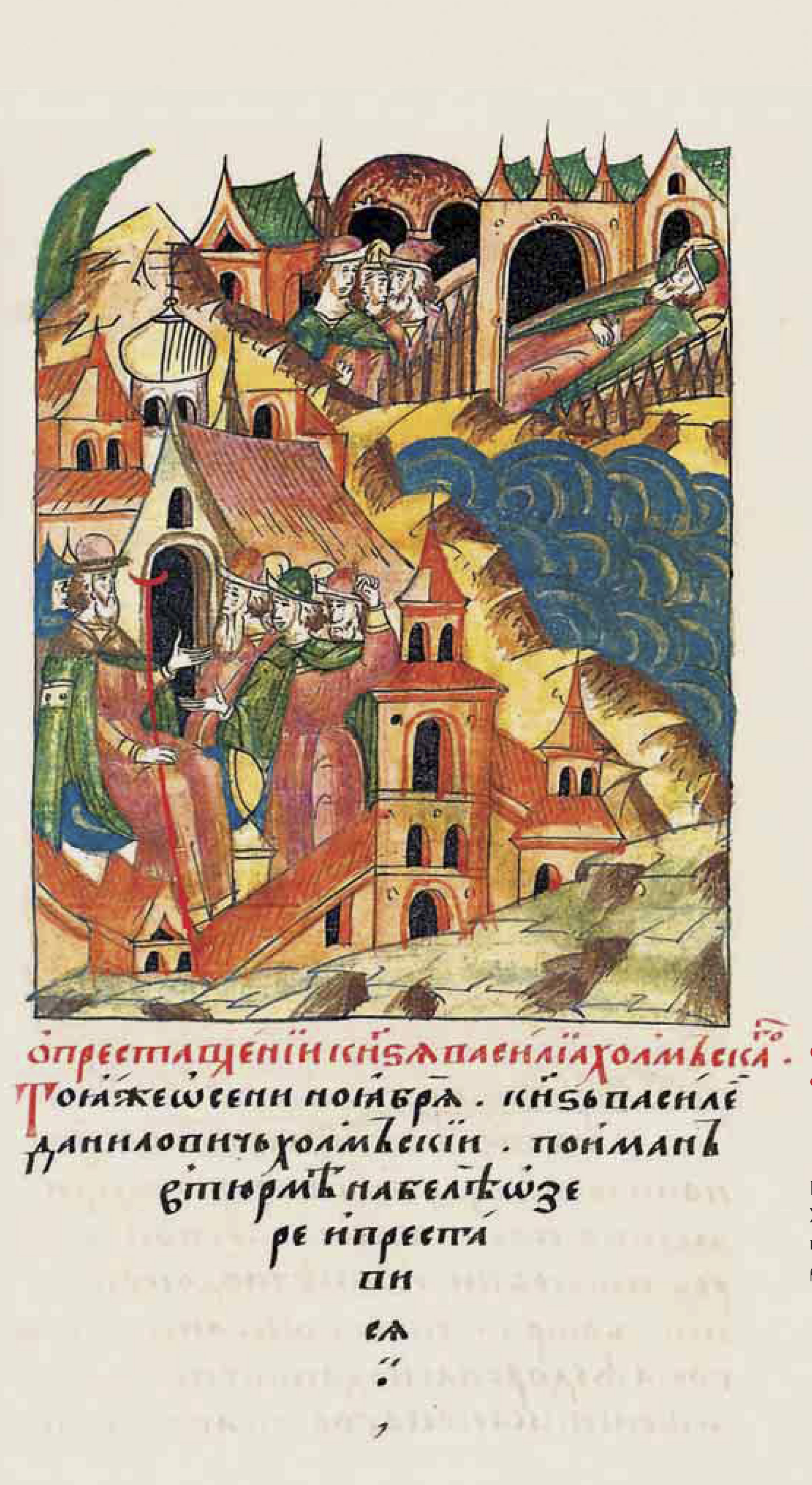 О кончине князя Ва- силия Холмского. В ту же осень в ноябре был схвачен князь Василий Даниилович Холмский, посажен в тюрьму на Белоозе- ре и там скончался